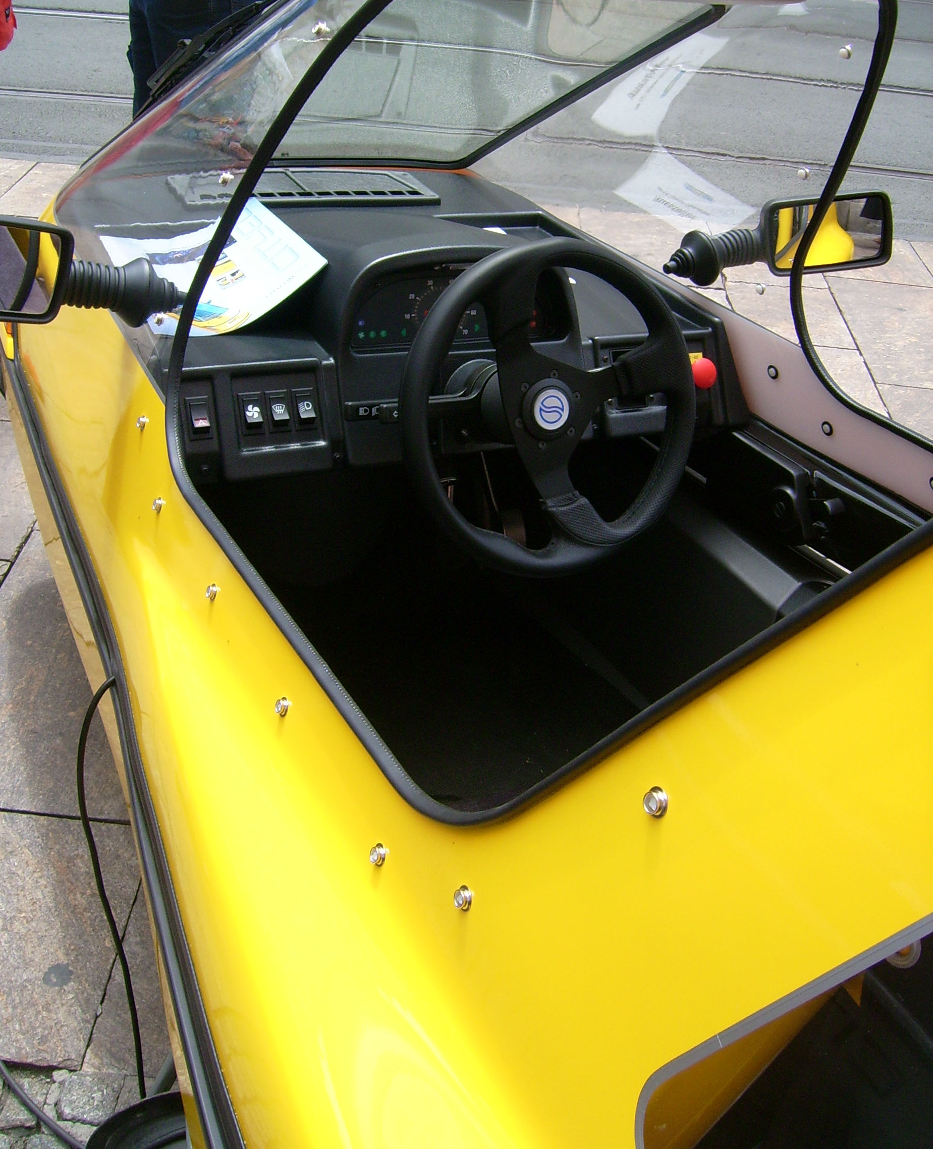 eigenes photo